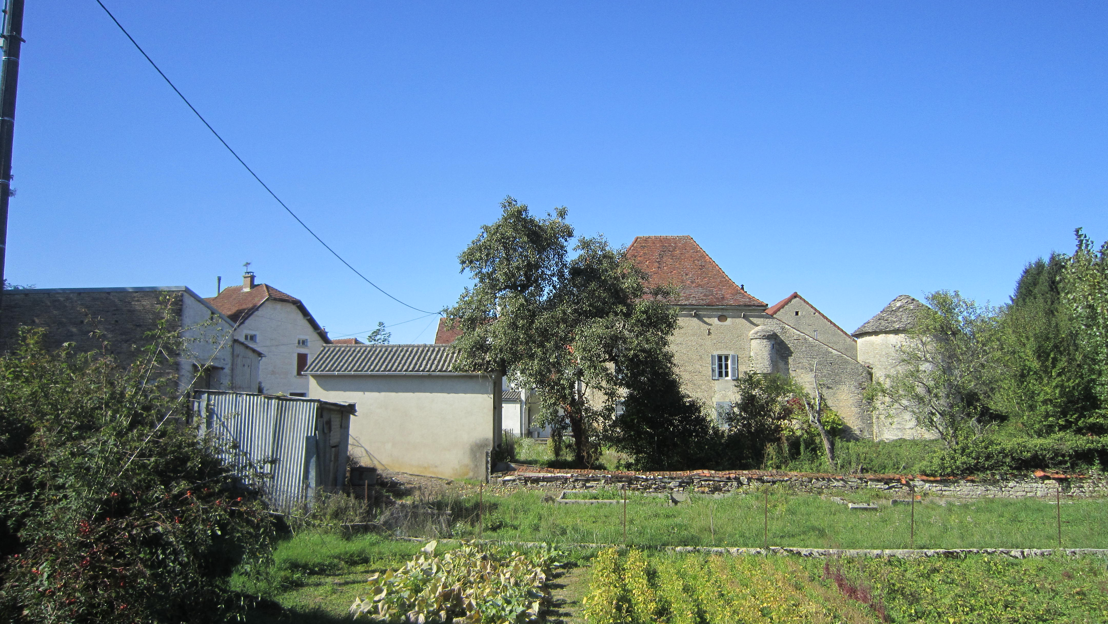 Veuxhaulles (Côte-d'Or)